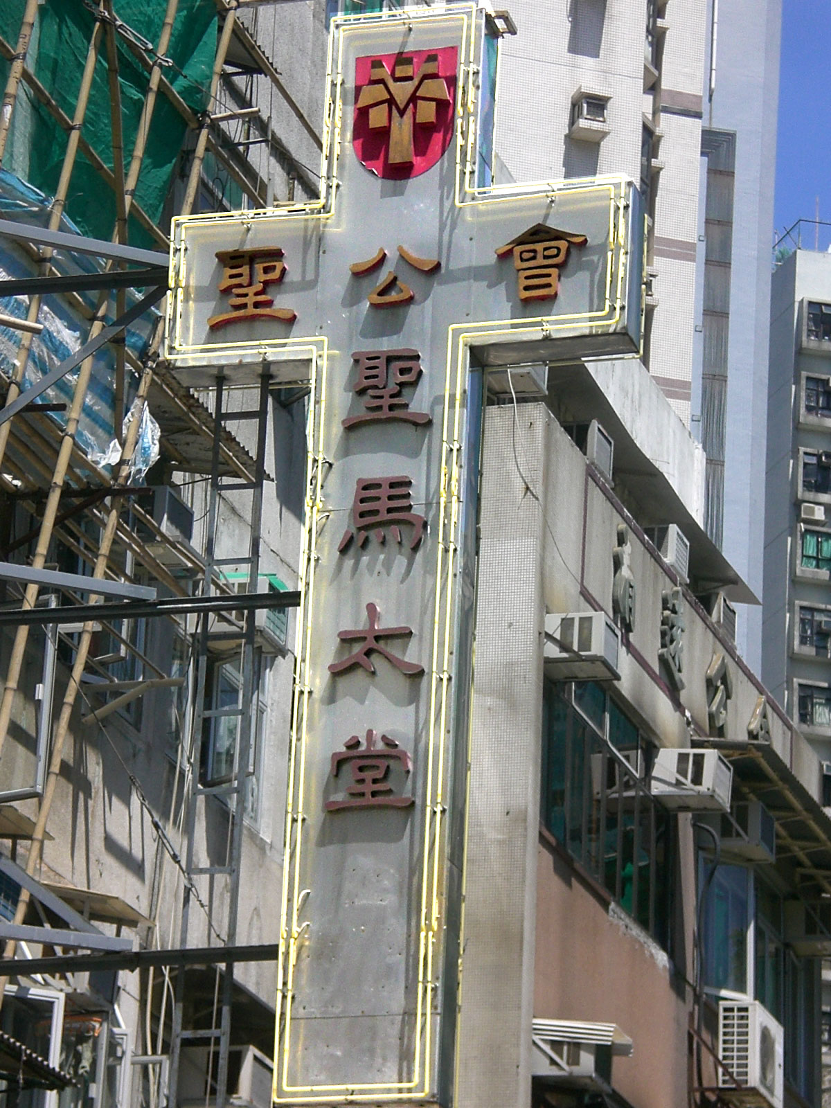 中文（香港）: 上環荷李活道228號, 聖公會聖馬太堂zh:教會十字架